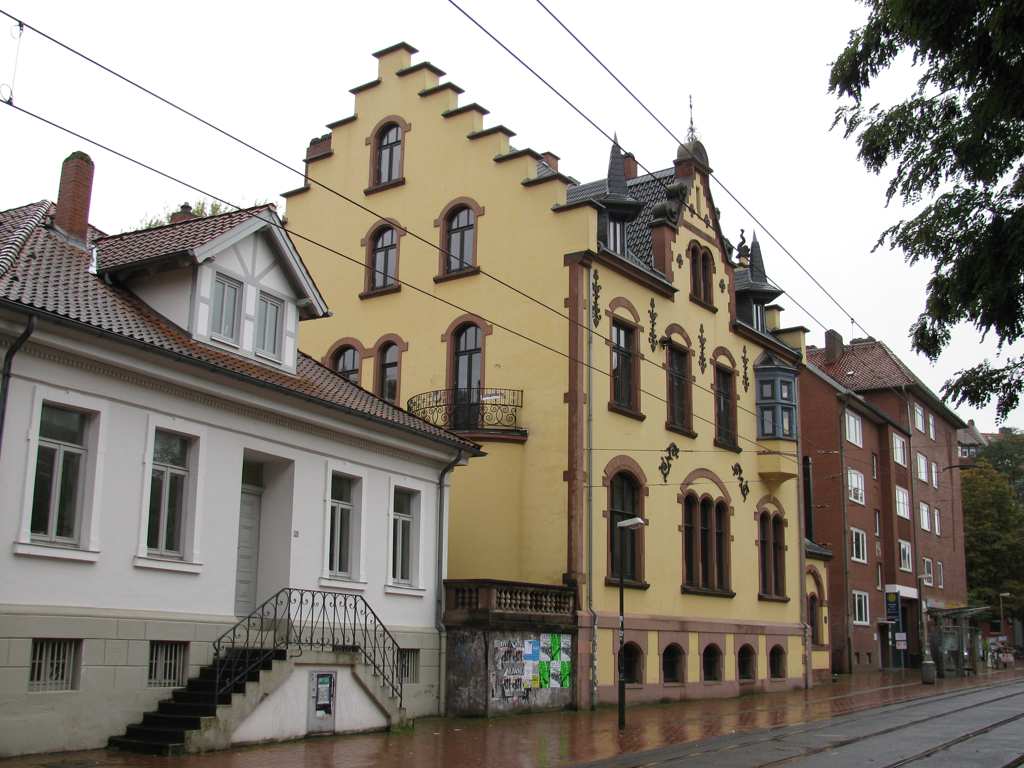 das Haus Davenstedter Straße 31 in Hannover-Linden